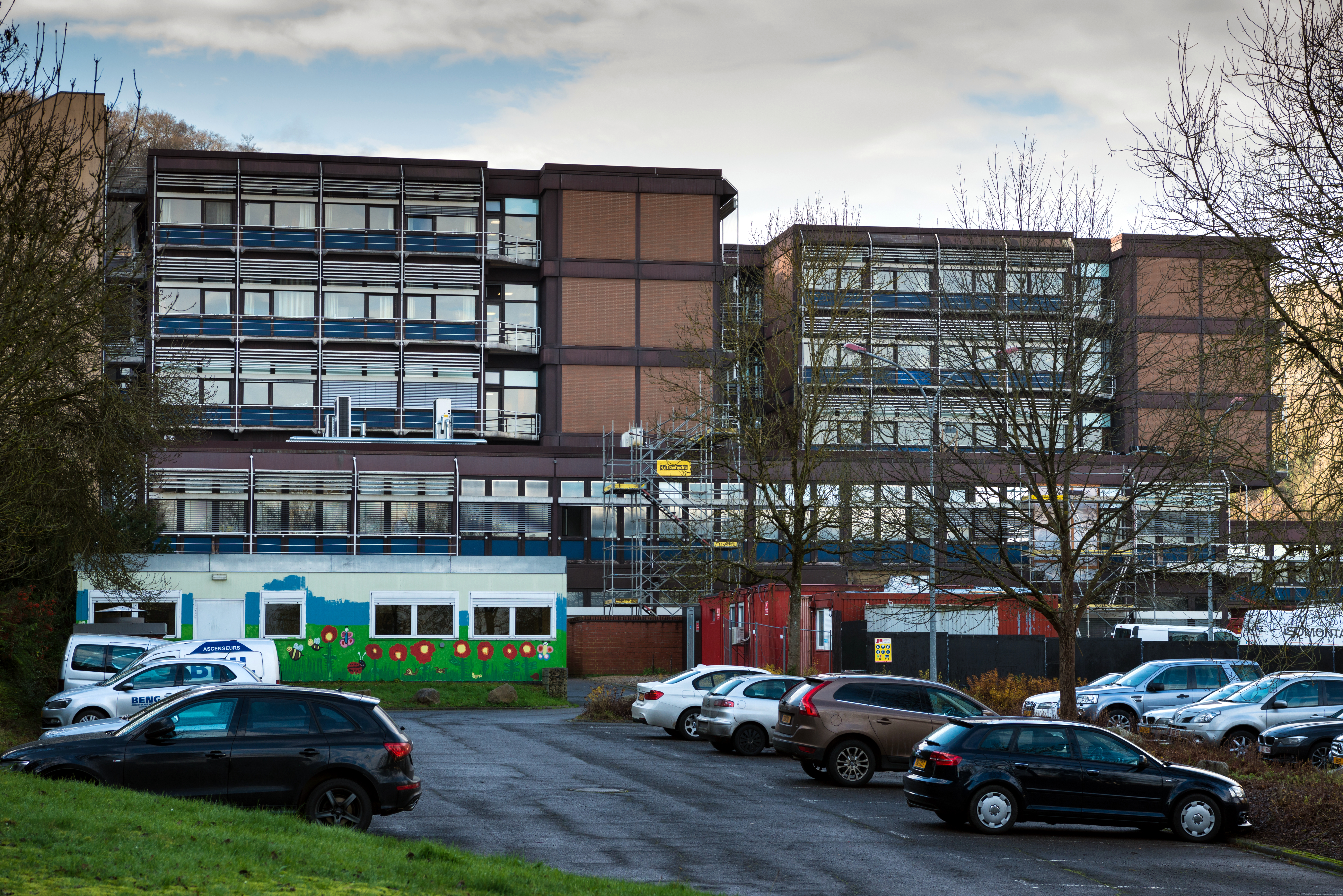 D'Nidderkuerer Spidol (Centre hospitalier Émile Mayrisch (Niedercorn) an der Avenue de la Liberté.